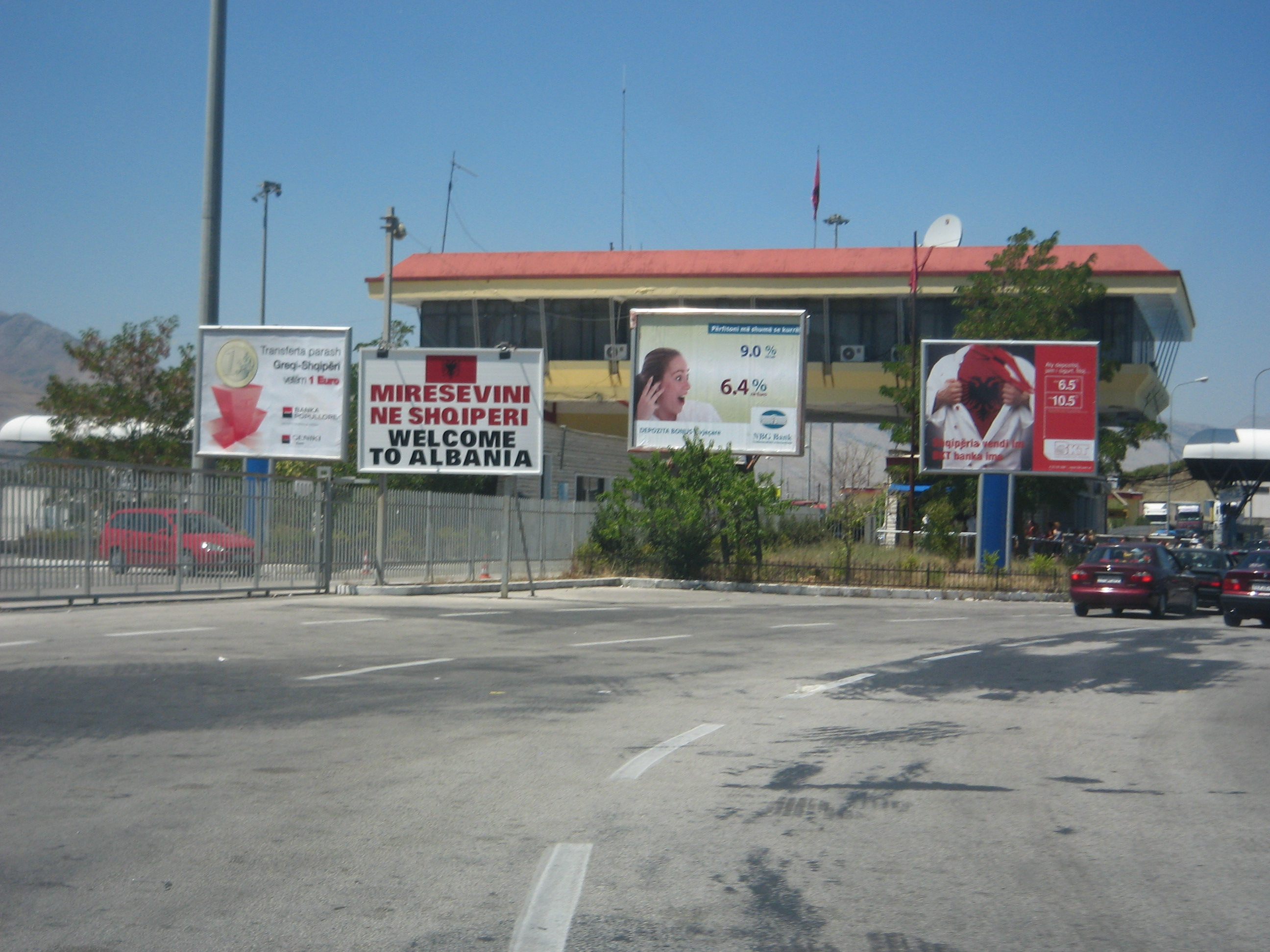 Welcome to Albania